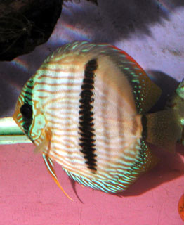 Photo prise en aquarium d'un discus Heckel du Rio Negro, photo prise par Nhamunda, membre de